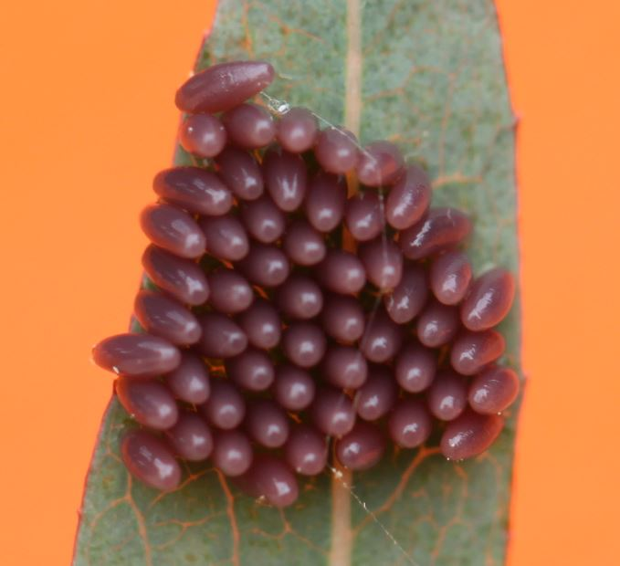 Eier des Pappelblattkäfers (Chrysomela populi) am 13. Mai 2018 nahe Fellbach